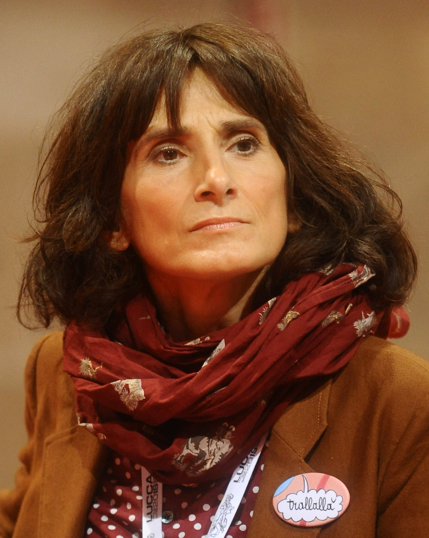 Sara Colaone a Lucca Comics & Games. Sala Robinson Chiesa di S. Giovanni